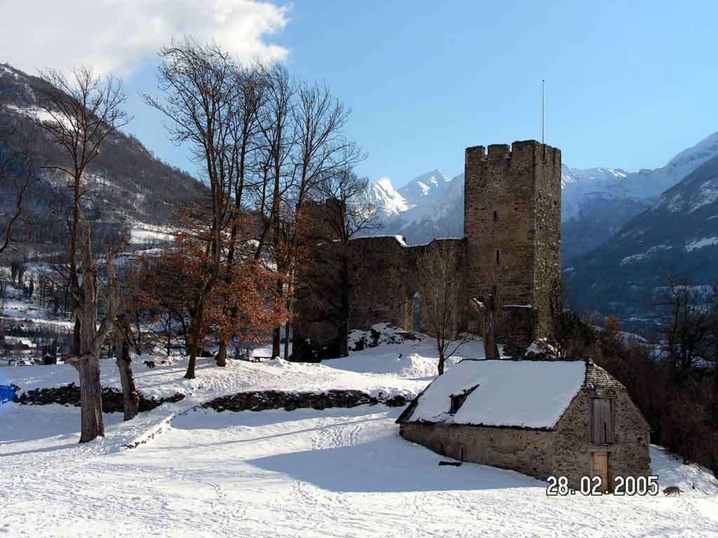 chateau-sainte-marie-luz-saint-sauveur-1